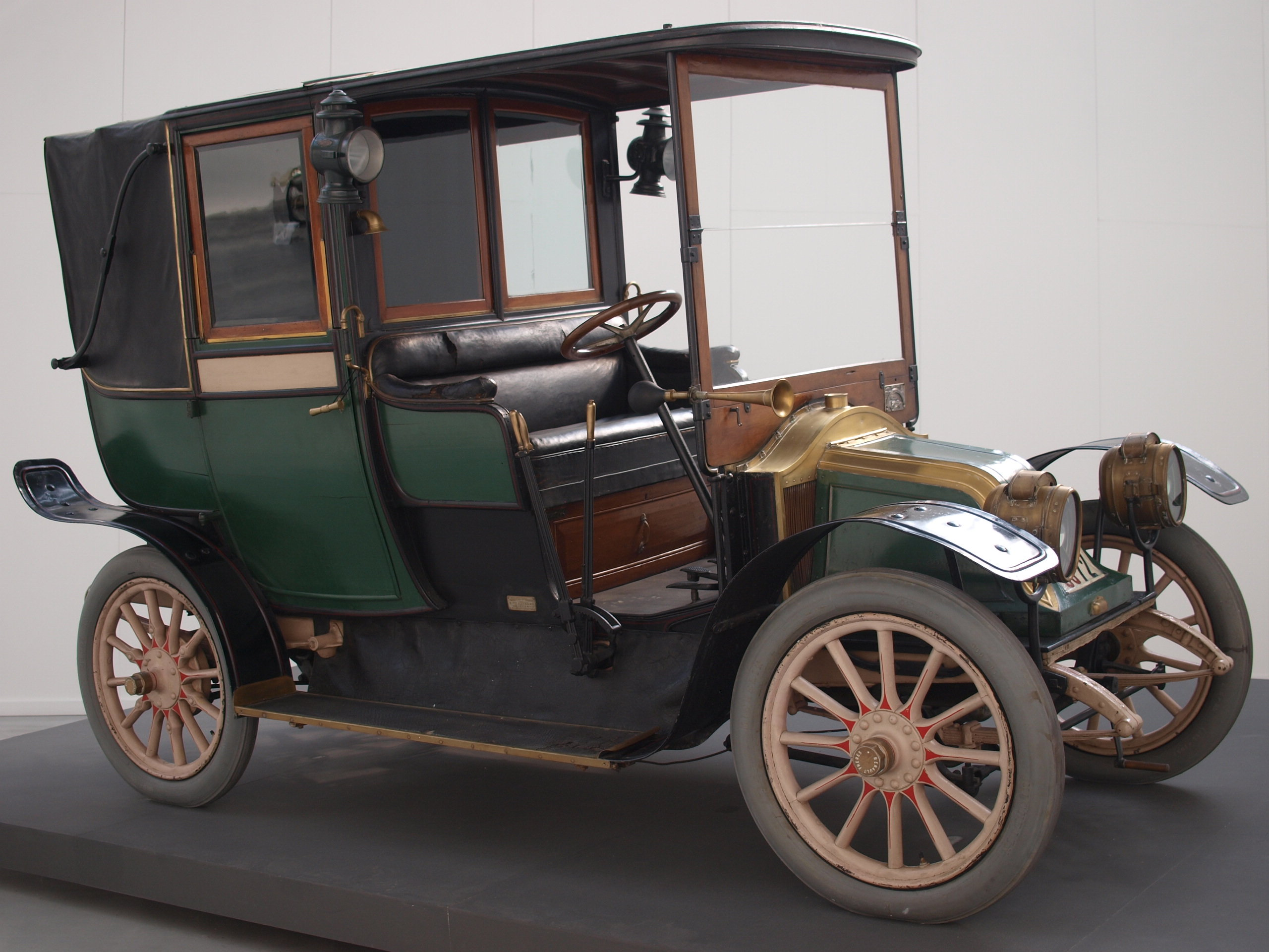 L'evoluzione dell'automobile Renault AG-Fiacre Paris 1910